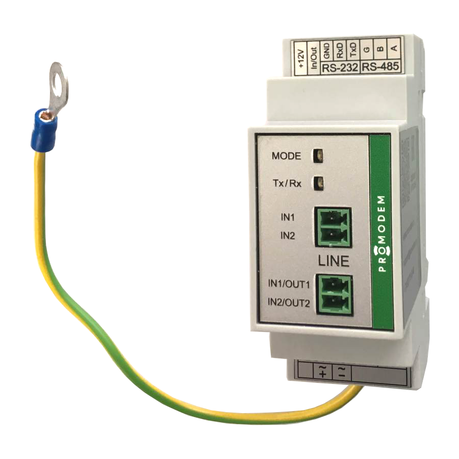 Телефонный аналоговый модем PROMODEM AnCom STF для опроса контроллеров и счетчиков по 2-/4-проводным линиям в стандартном и ограниченном ТЧ диапазоне